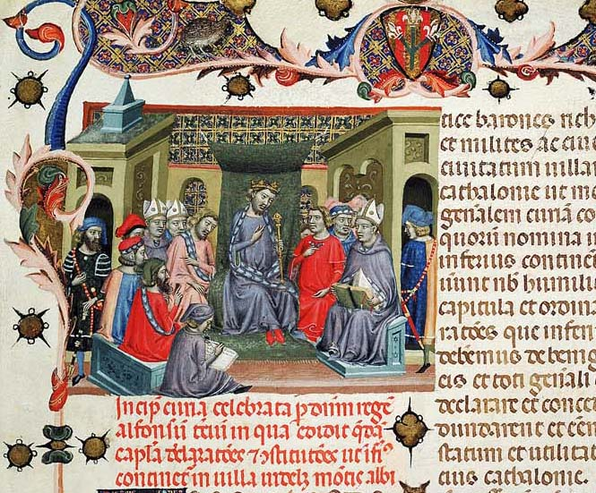 Usaticis Barchinonensis-Usatges de Barcelona. Corts de Montblanc